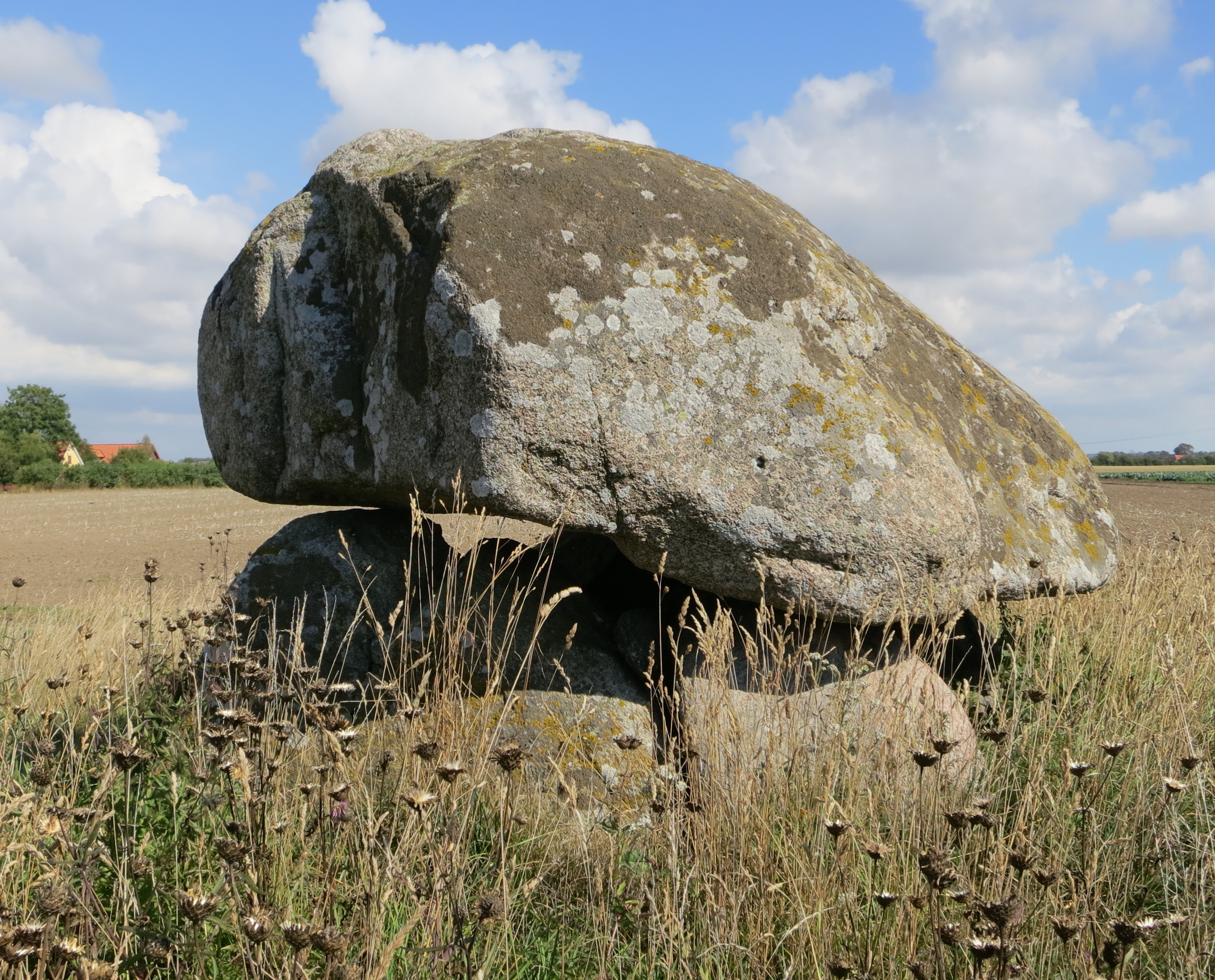 Klockaredösen öster om Vellinge i Skåne